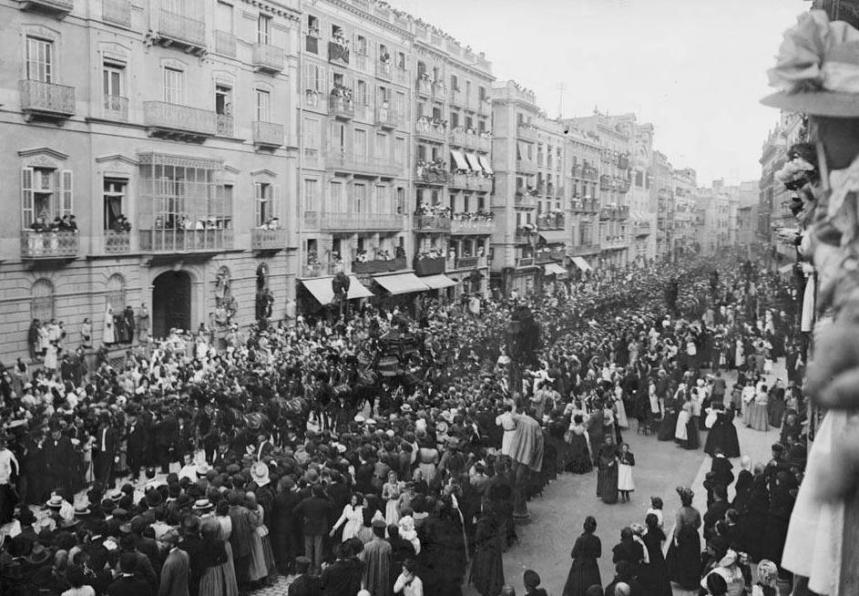 Imatge